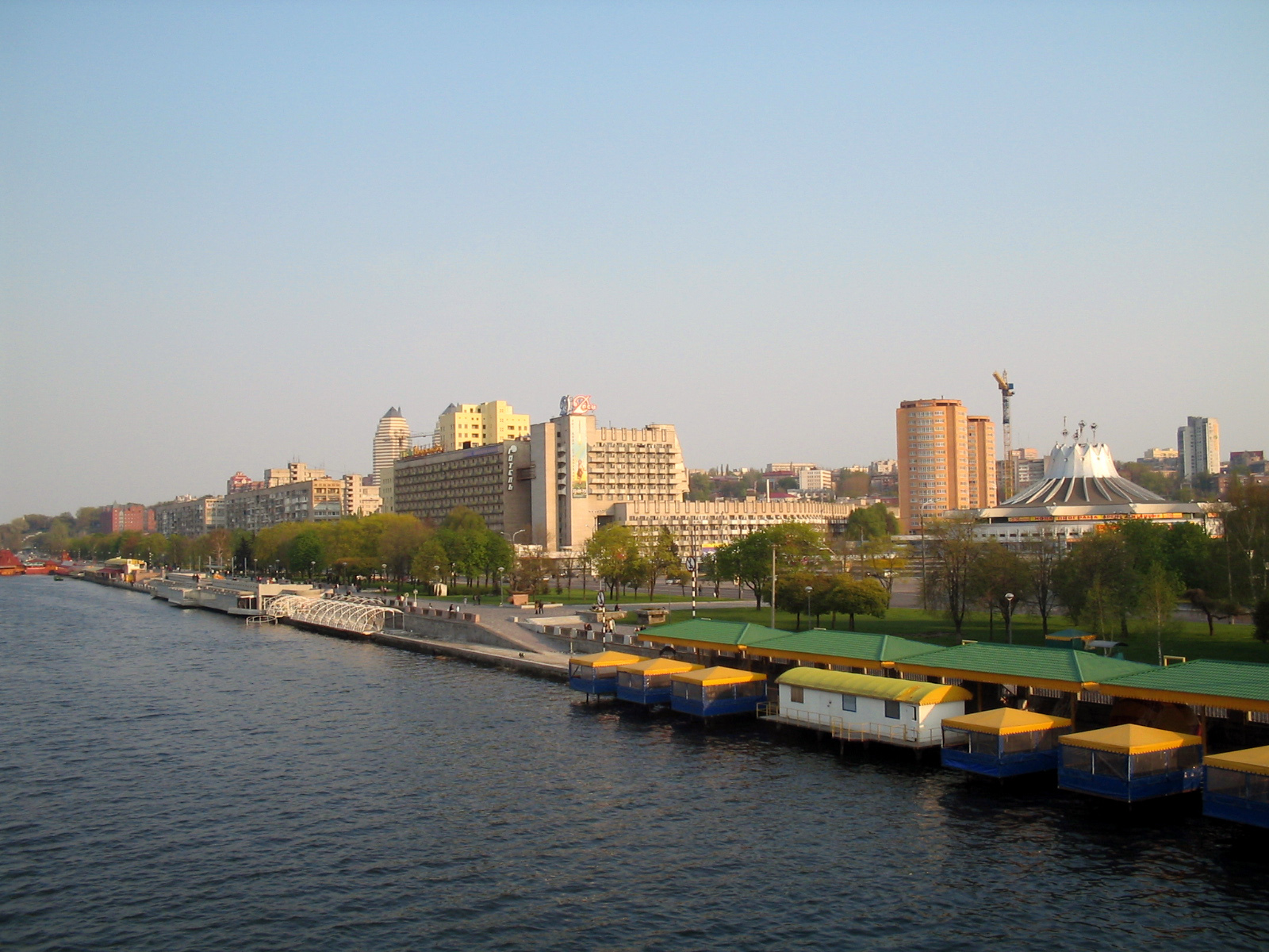 Вид на набережну з Центрального мосту